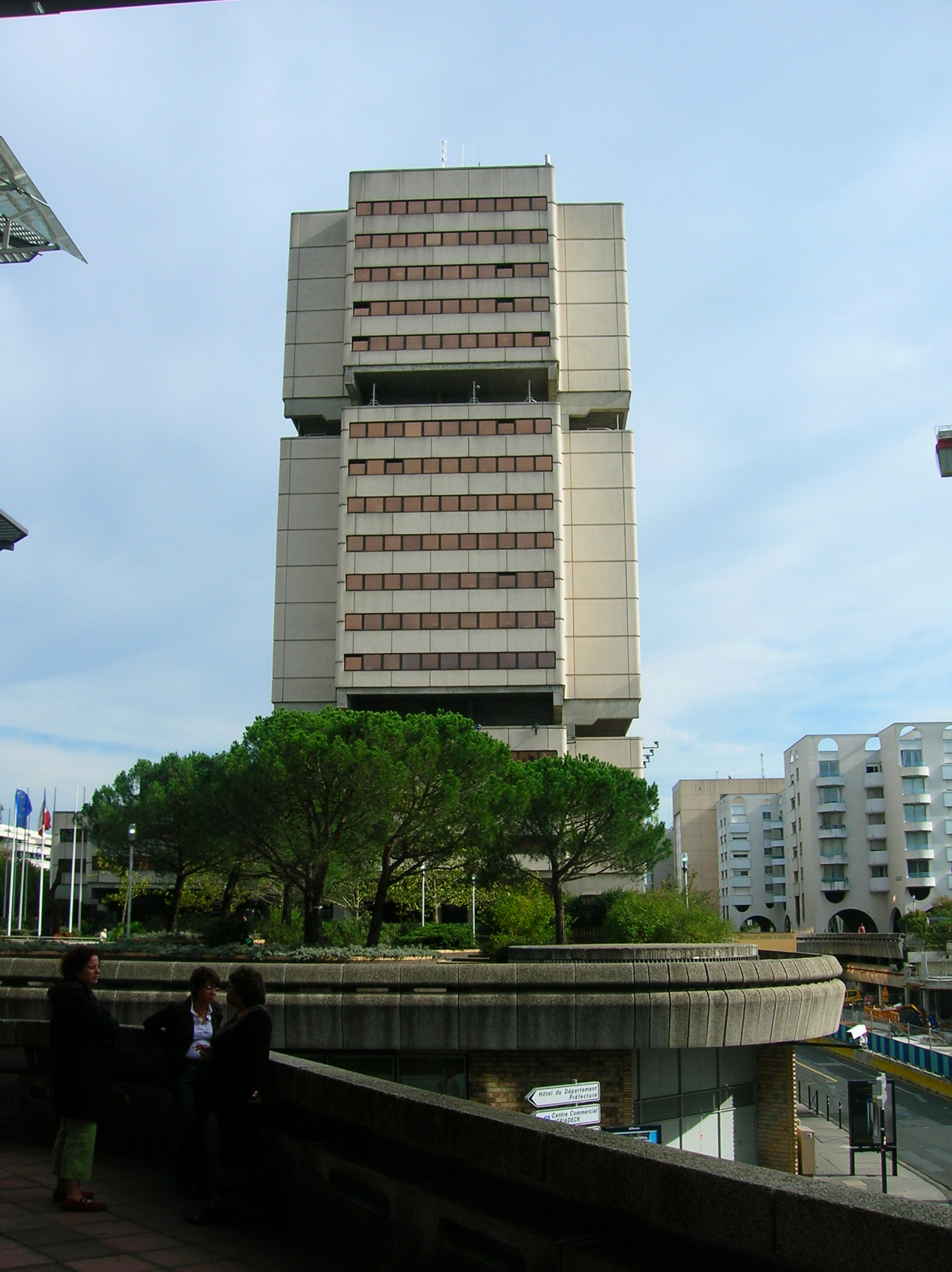 Immeuble de la Communauté Urbaine de Bordeaux